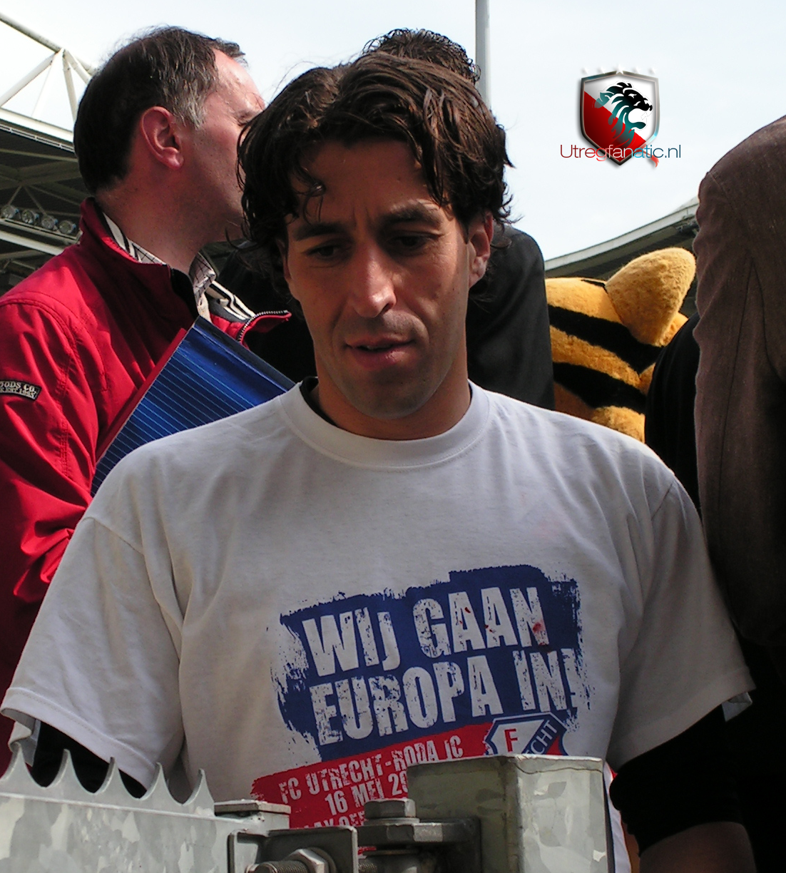 Khalid Sinouh